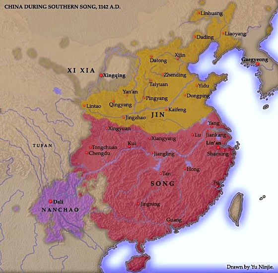 Dinastía Song del sur